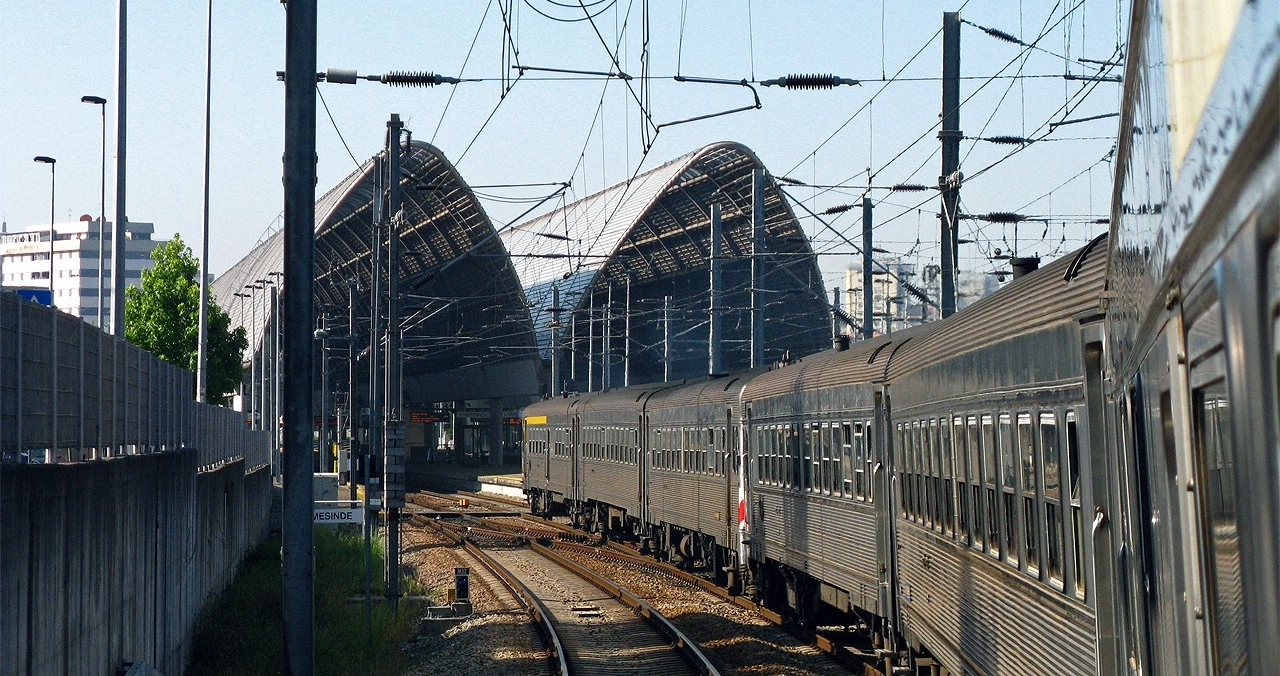 ...aka Ermesinde